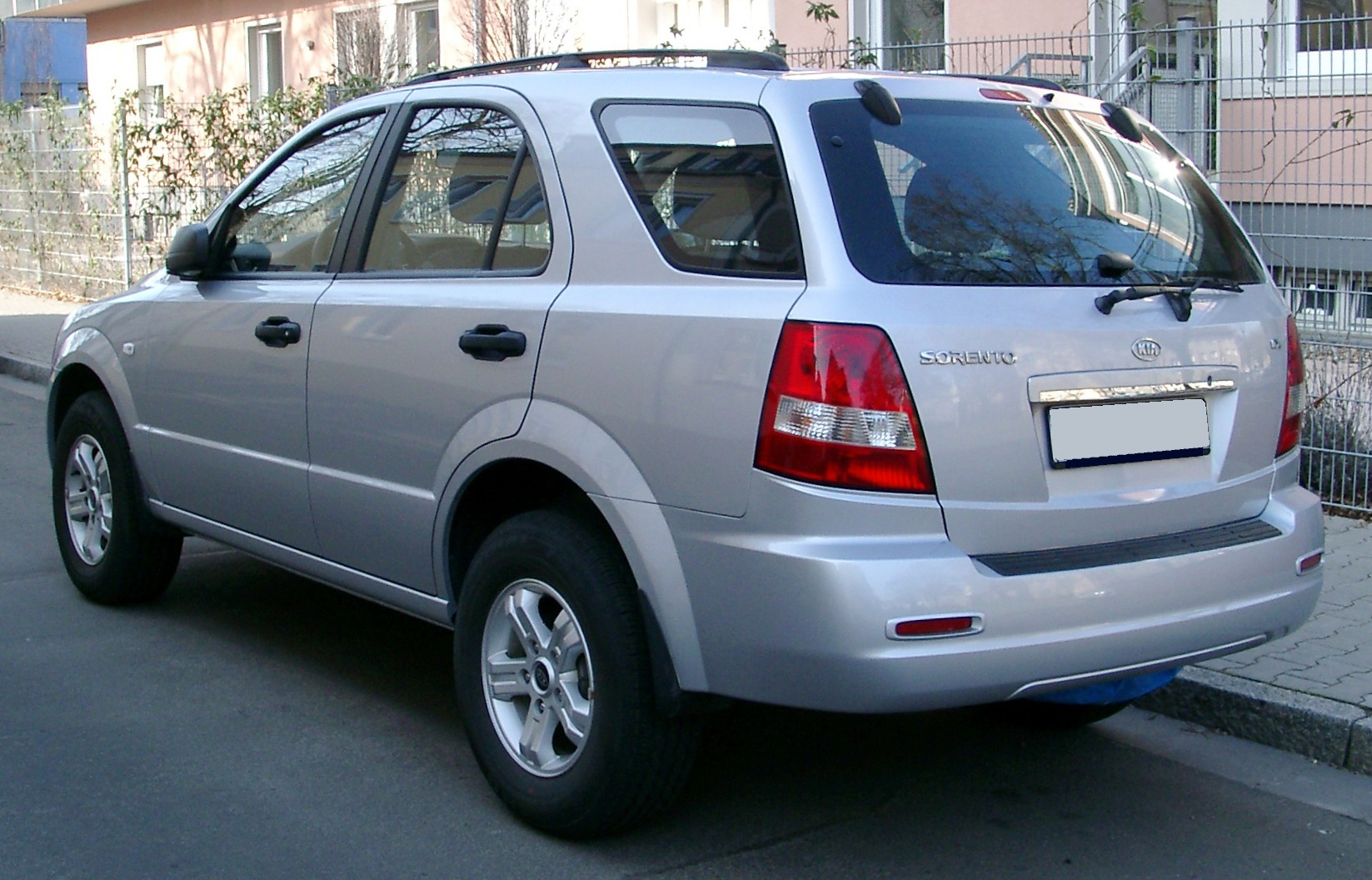 Kia Sorento